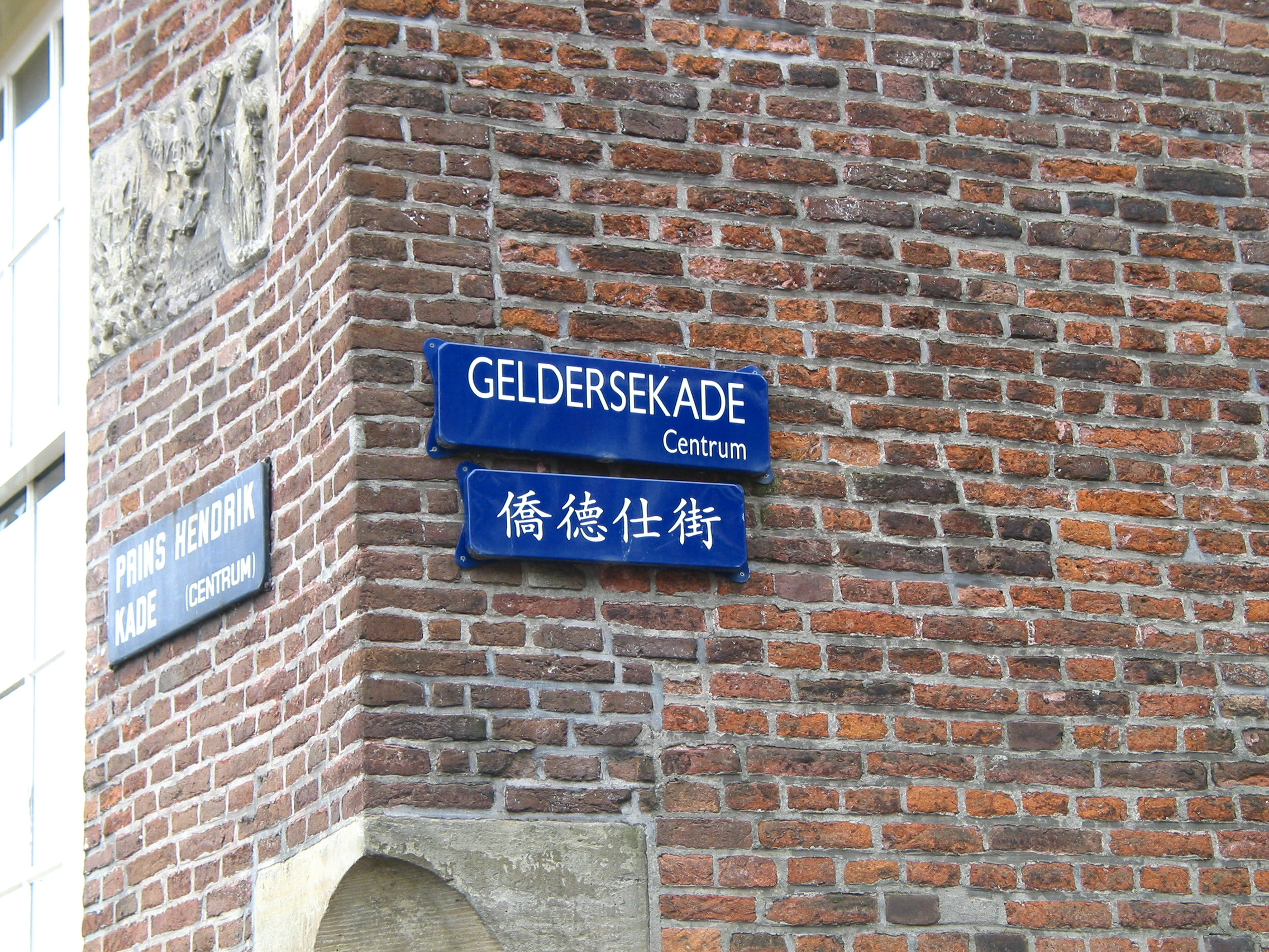 Straatnaambord op de Geldersekade aan de kant met de onevennummers, Amsterdam, Noord-Holland